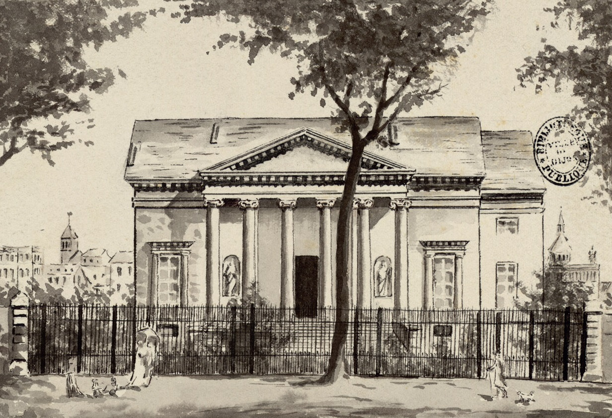 Maison Saint-Père, rue des Godrans, estampe, lavis, 12 x 17 cm, Bibliothèque municipale de Dijon, cote : L Est. AG-III 2 (aquarelle originale à la cote L Est. 1083).